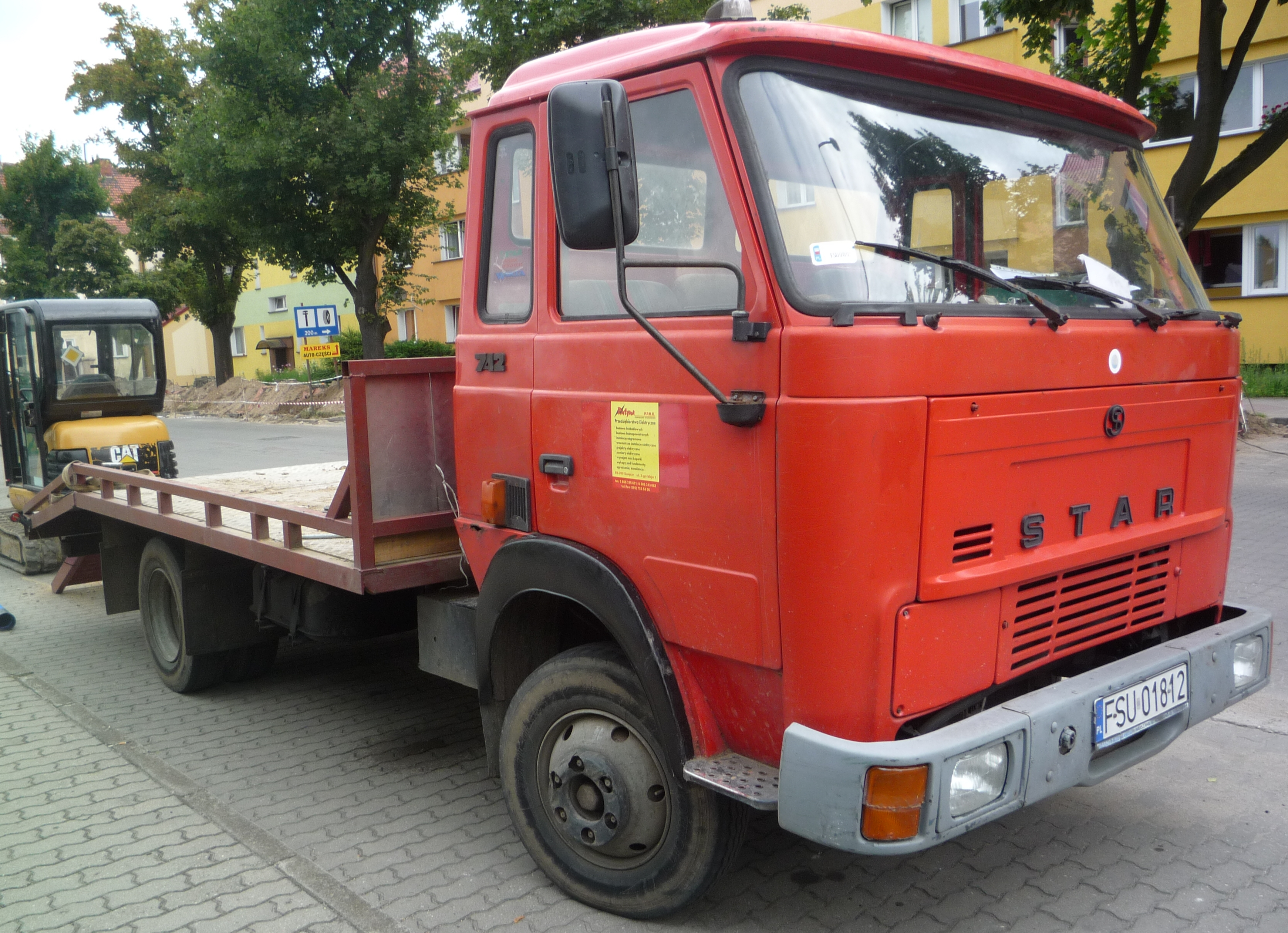 Star 742 w Słubicach.